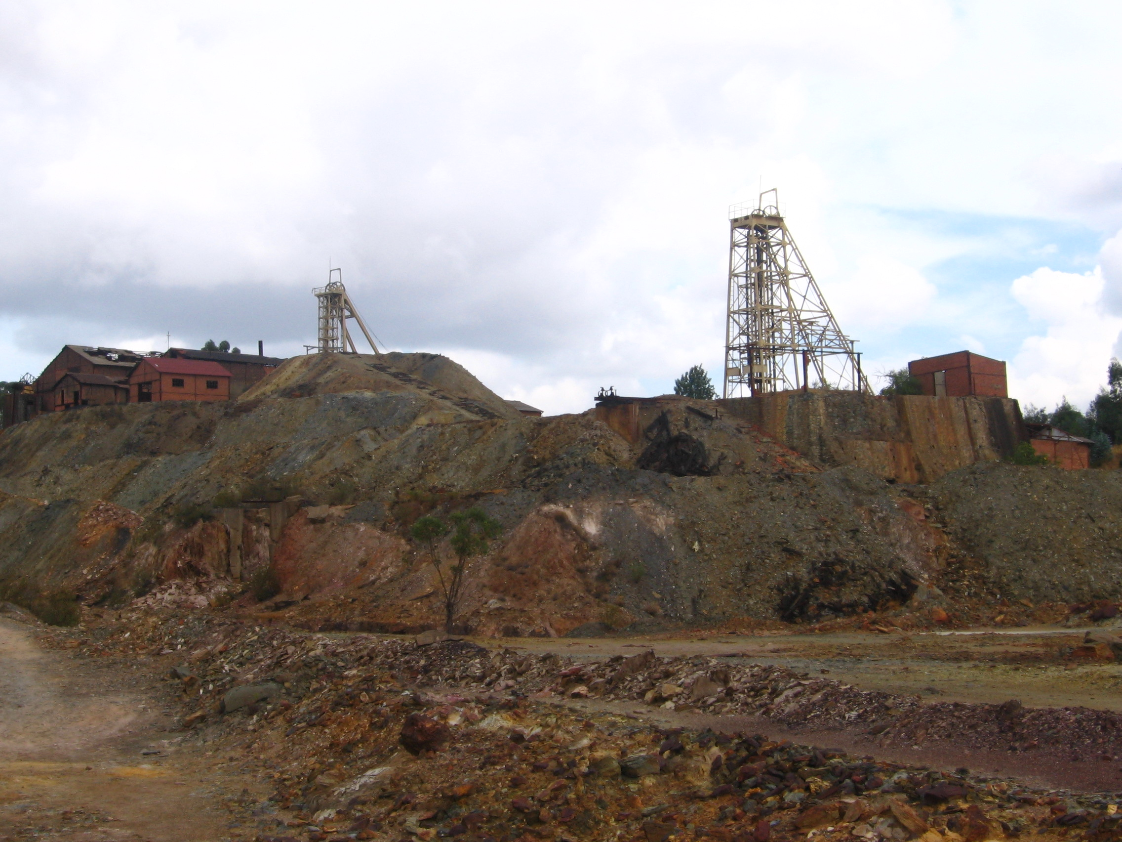 Poços 1 e 2 da Mina do Lousal, Grândola, Portugal